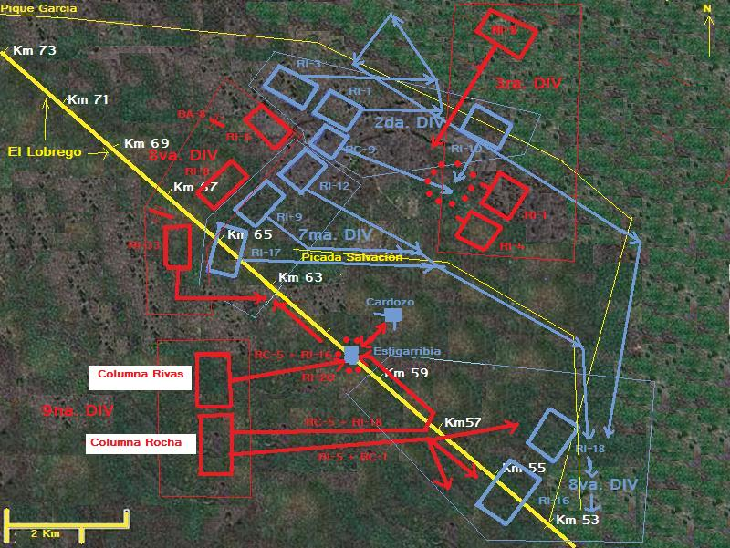 Guerra del Chaco. Batalla de Strongest. Retirada paraguaya (Divs. 2 y 7) mayo 1934.